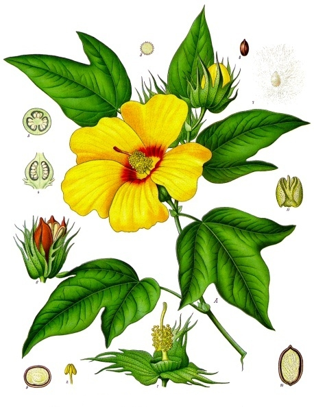 Baumwolle. A blühender Zweig, nat. Grösse; 1 Blüthe ohne Kronblätter, desgl.; 2 Staubgefässe, vergrössert; 3 Pollen, desgl.; 4 und 5 Fruchtknoten im Längs- und Querschnitt, nat. Grösse; 6 Frucht, desgl.; 7 Same mit Samenhaaren, vergrössert; 8 derselbe ohne Samenhaare, desgl.; 9 und 10 derselbe in Längs- und Querschnitt, desgl.; 11 Embryo, desgl.